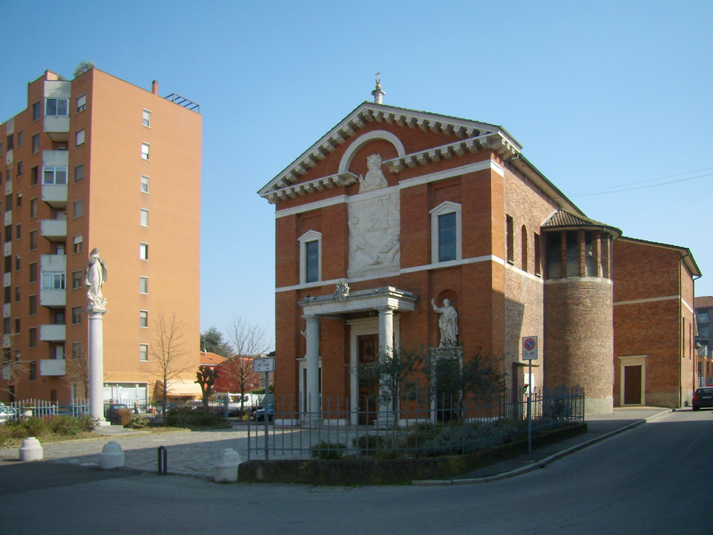 La chiesa dei SS. Pietro e Paolo a Borgolombardo, quartiere di San Giuliano Milanese